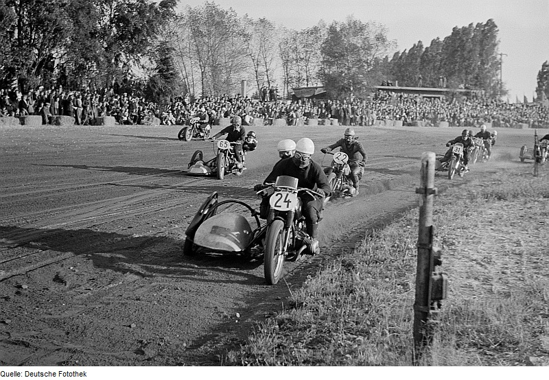 Original image description from the Deutsche Fotothek Motorrad-Sandbahnrennen in Panitzsch